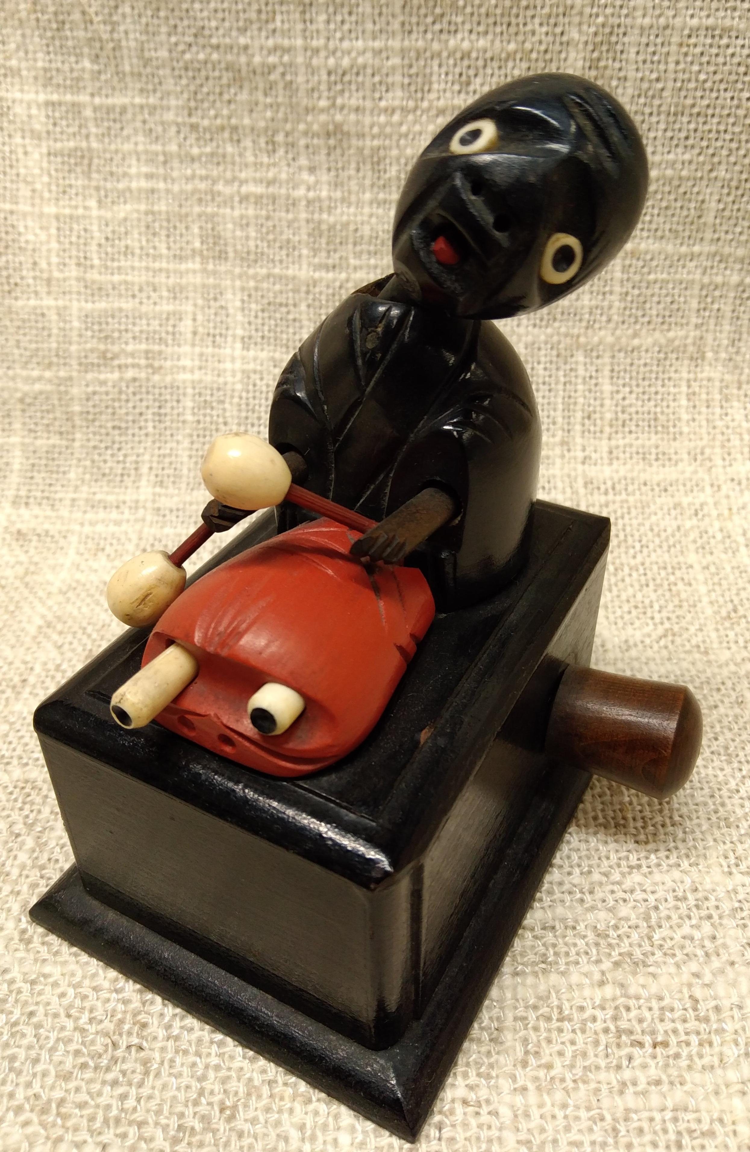 小田太四郎製神戸人形